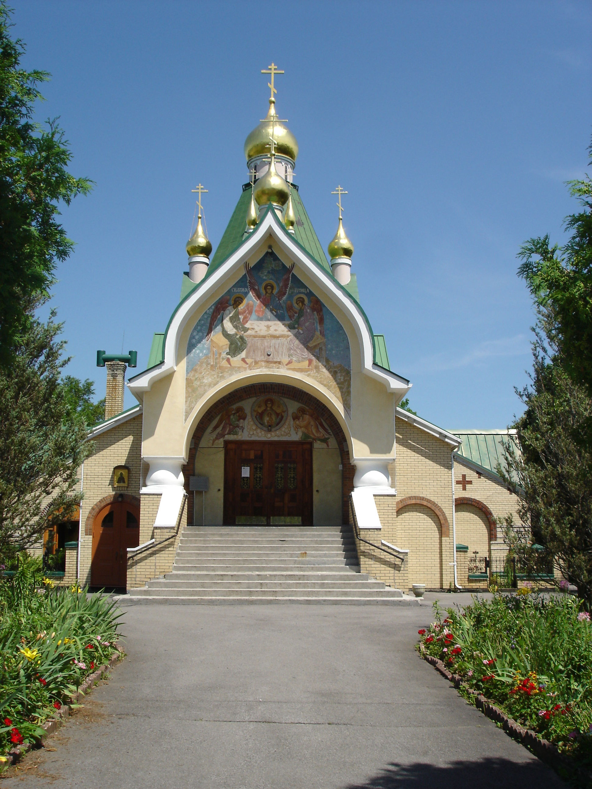 Cтавропигиальный Свято-Троицкий Монастырь